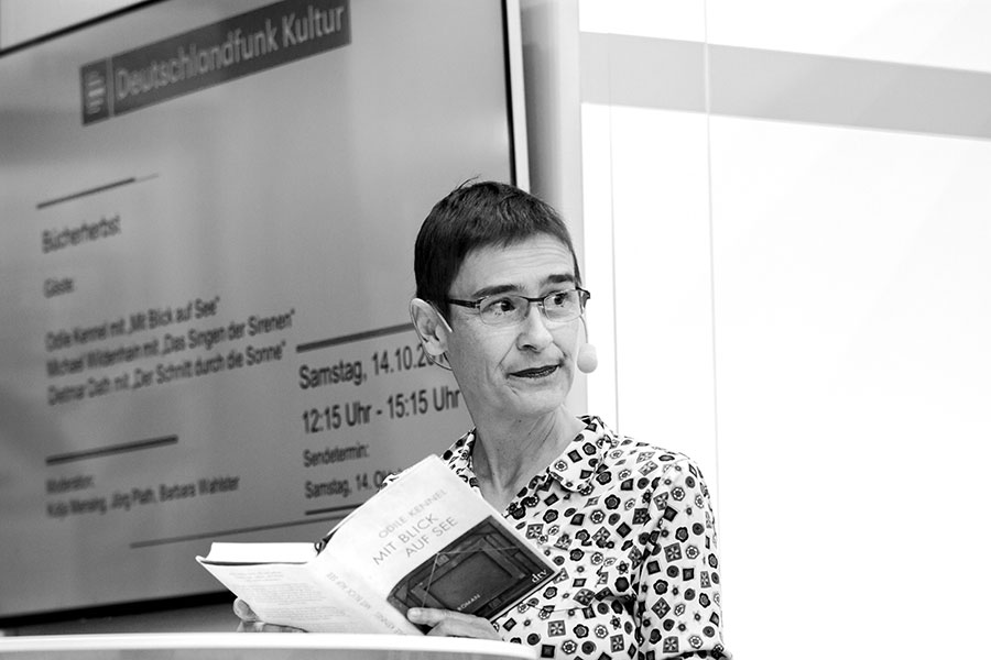 Odile Kennel auf der Frankfurter Buchmesse 2017. „Mit Blick auf See“